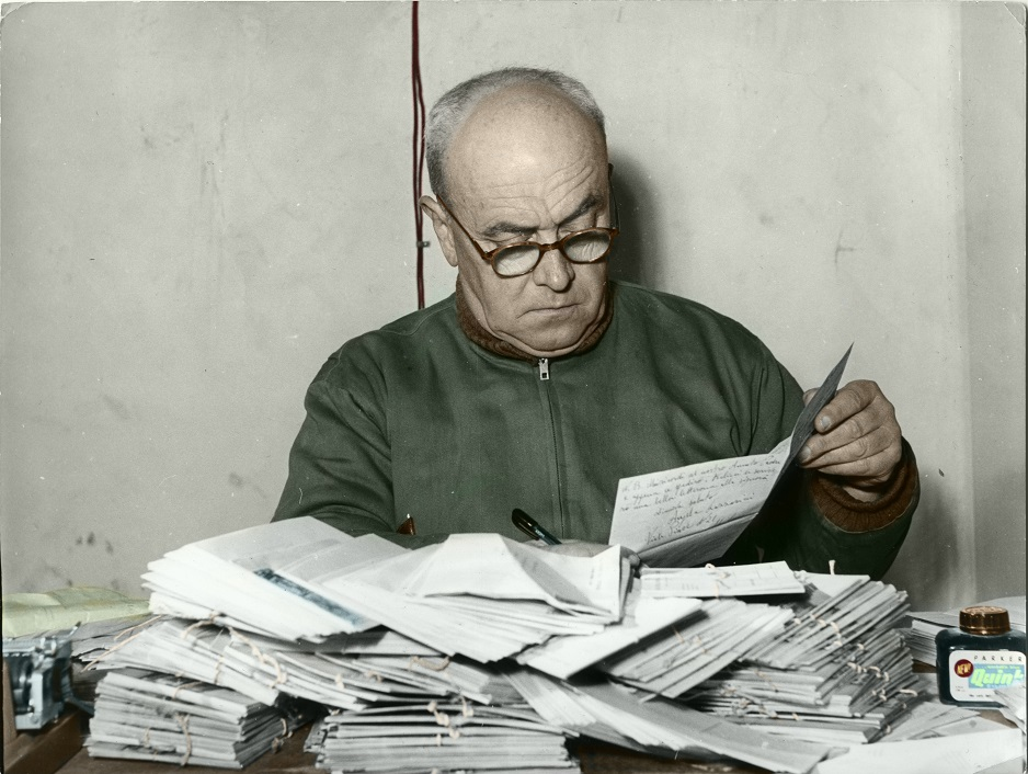 Dottor Sanguinetti in ambito lavorativo